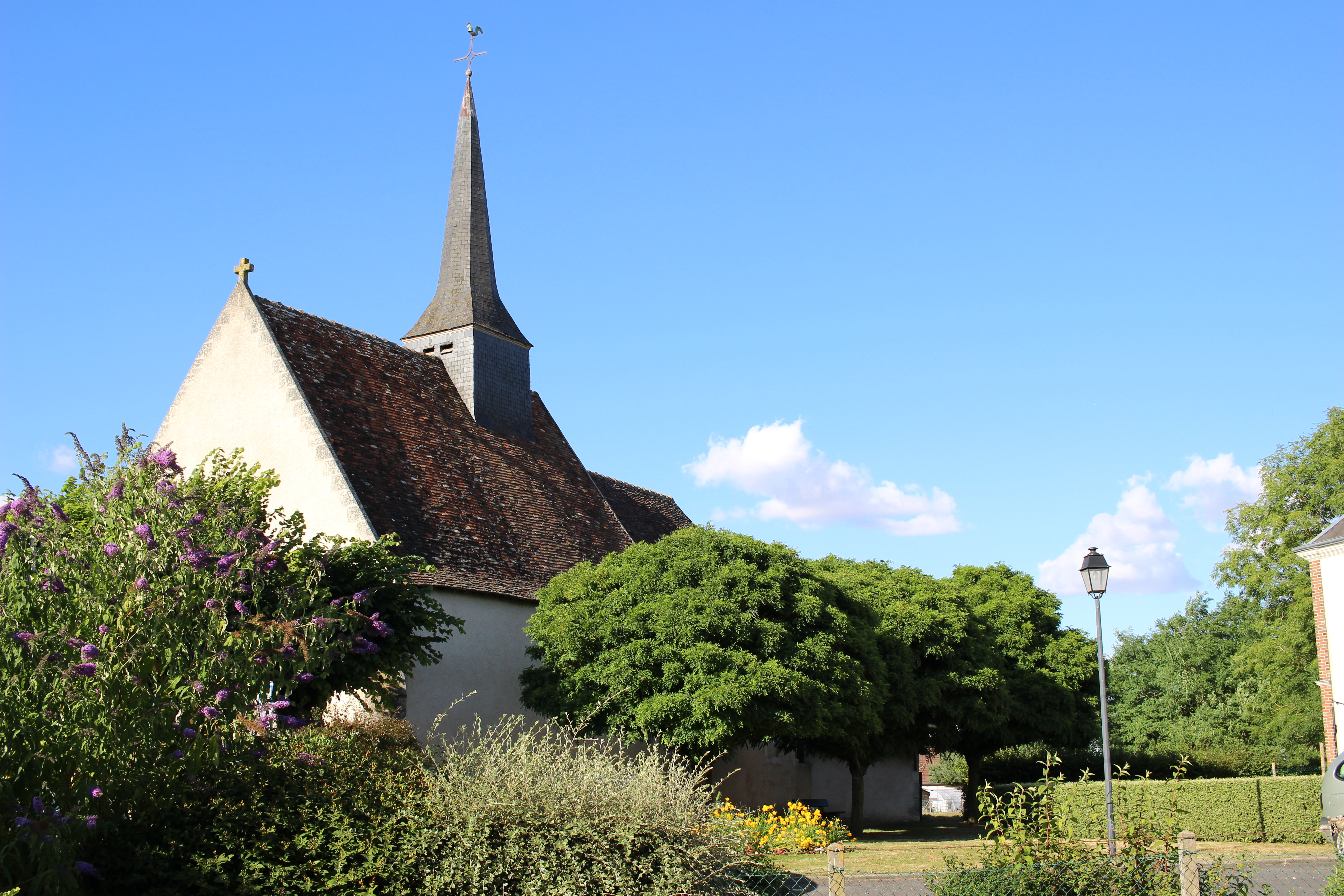 Le clocher de l'église en Morand.